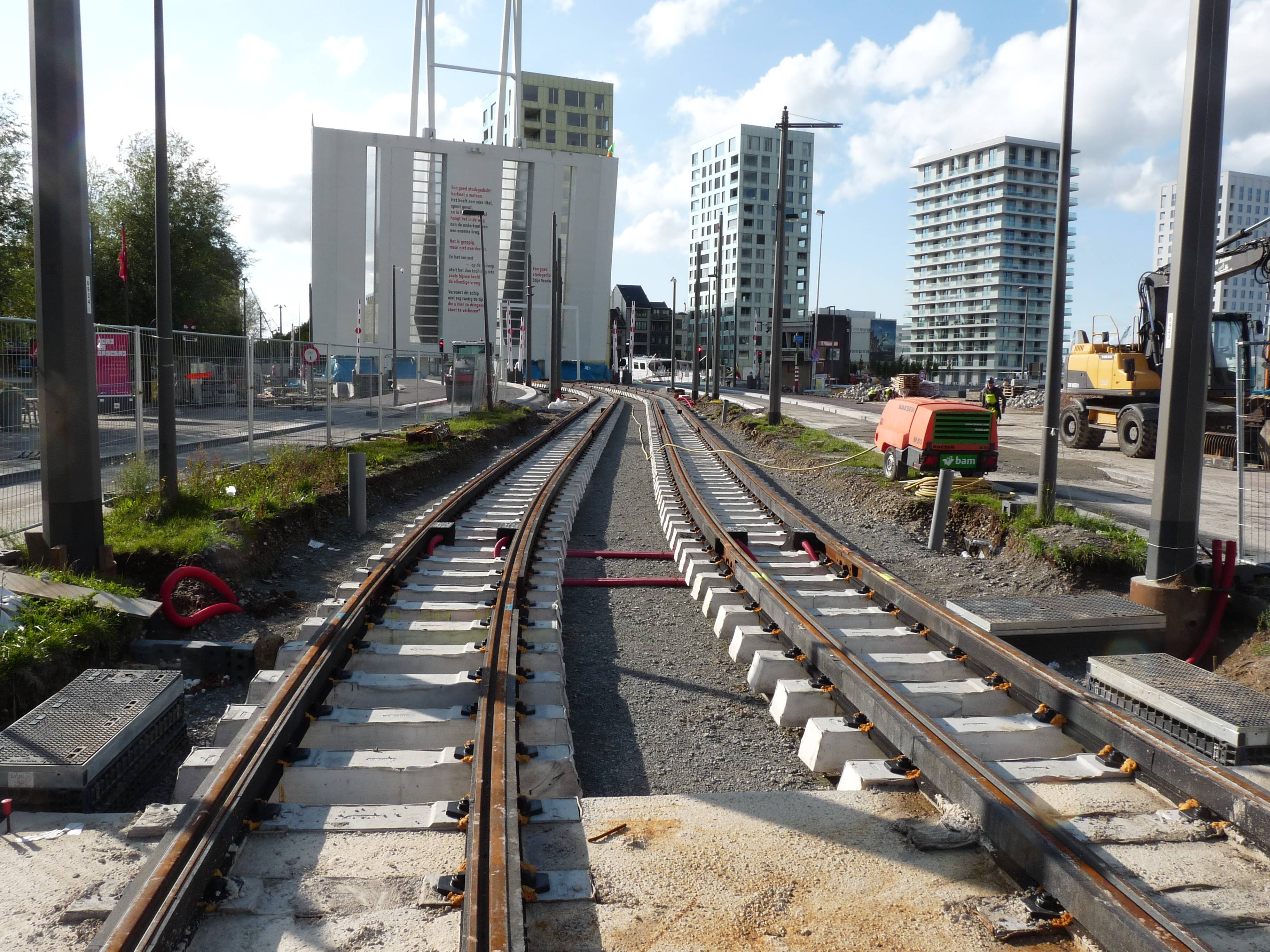 Tramspooraanleg in de Londenstraat. Op de achtergrond de Londenbrug.